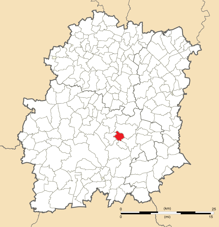 Carte de position de Boissy-le-Cutté en Essonne (91)